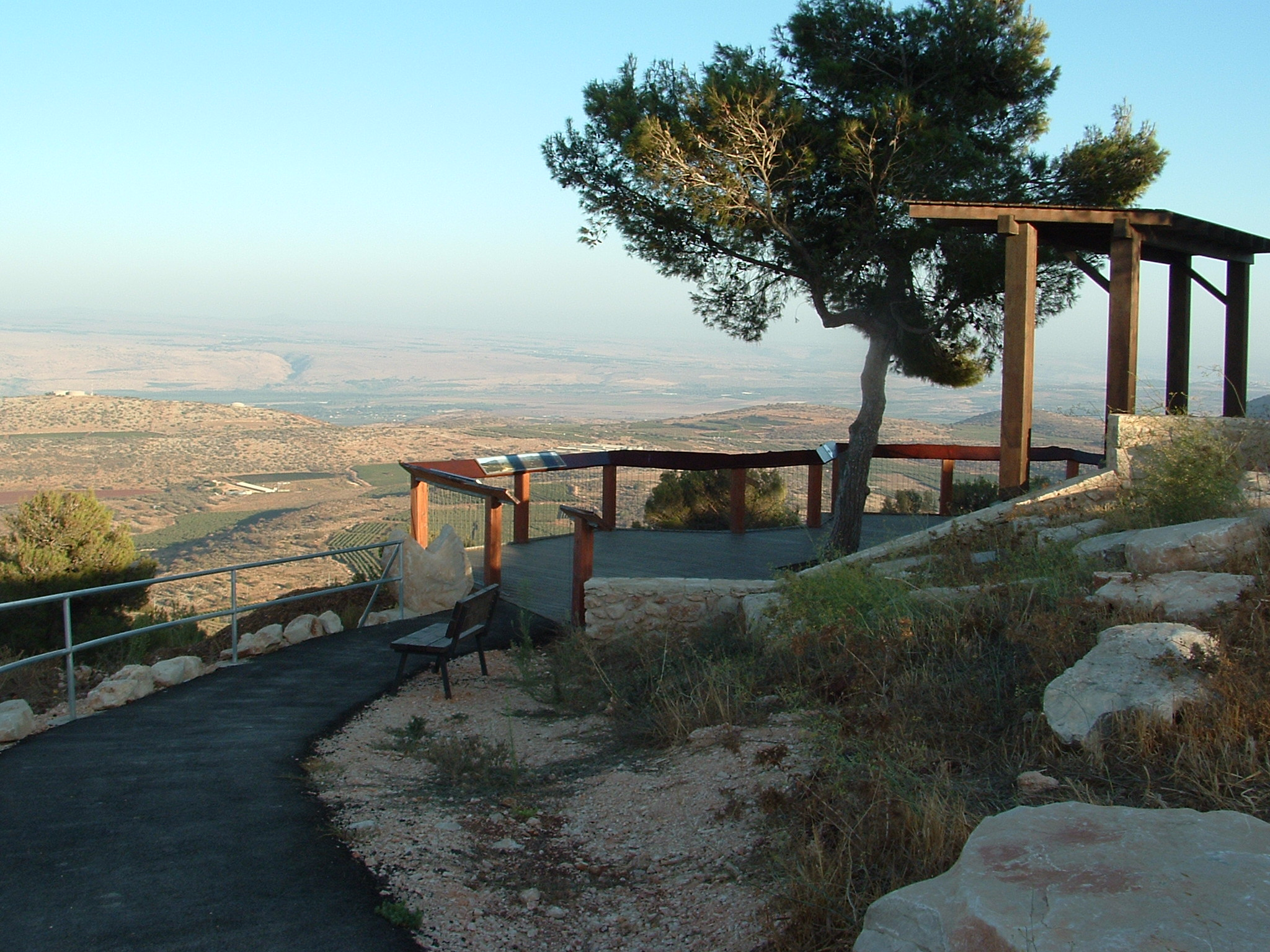 קרבות מלכיה הם סדרה של ארבעה קרבות, שניים מהם עתירי נפגעים ישראליים, שהתרחשו במהלך מלחמת העצמאות בסמוך למלכיה, שעל גבול לבנון